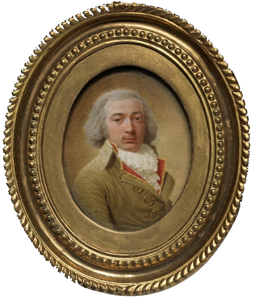 Zelfportret (Joseph Octave van der Donckt, 1789); collection: Musea Brugge - Groeningemuseum